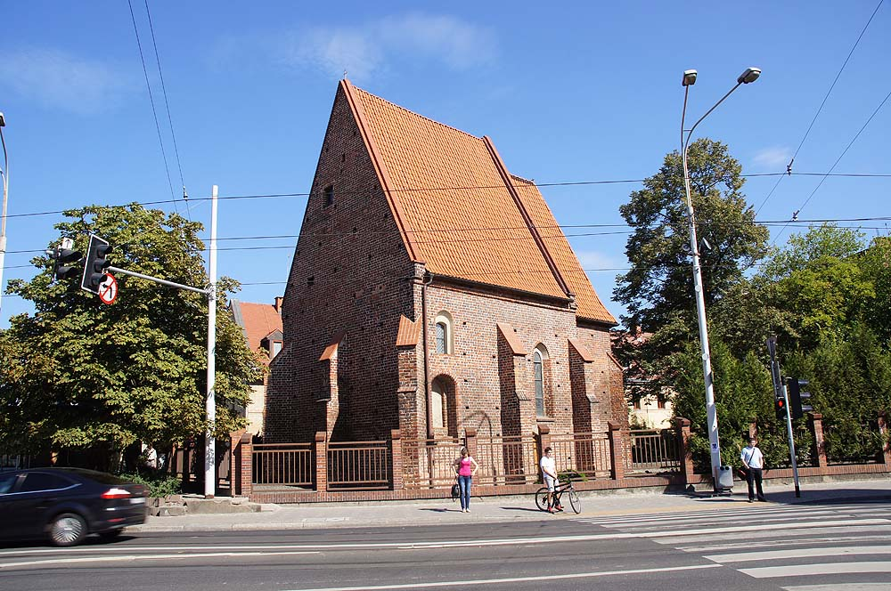 Wrocław Krzyki, ul. Traugutta 52 - Kościół św. Łazarza, d. szpitalny (zabytek nr 425/75)